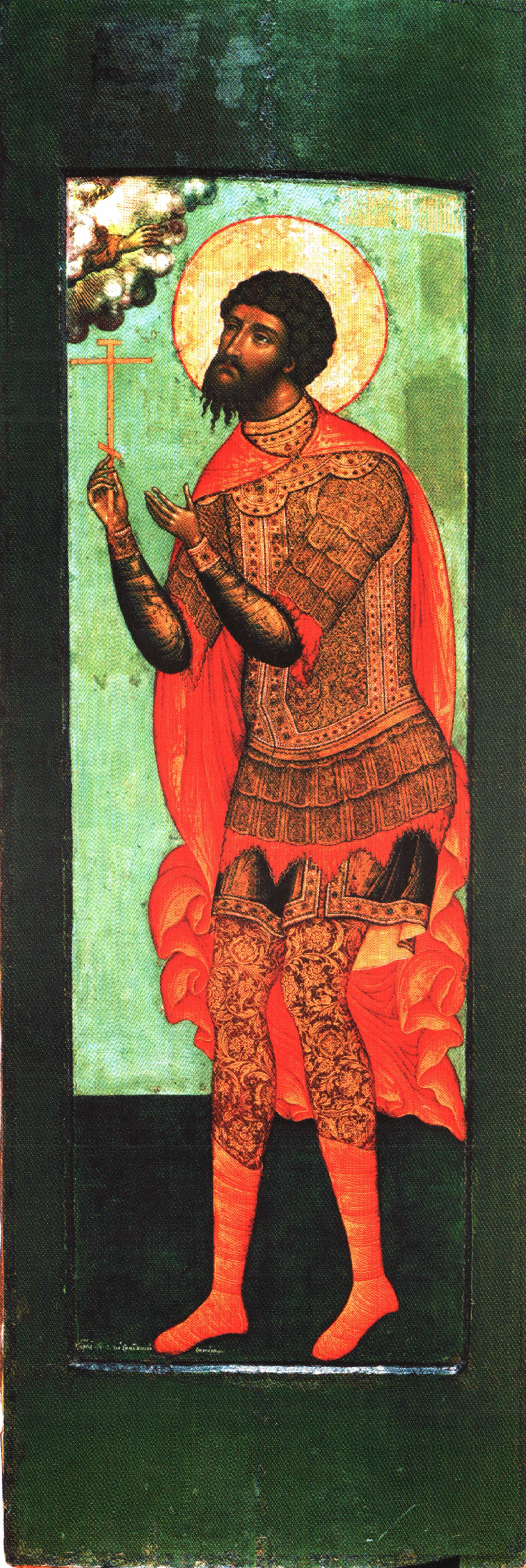 ST. THEODORE STRATELATES THE GREAT MARTYR. 1676 Simon Ushakov with other masters Wood, tempera From the Archangel Cathedral, Moscow Kremlin The Moscow Kremlin State Historical and Cultural Museum ВЕЛИКОМУЧЕНИК ФЕОДОР СТРАТИЛАТ. 1676 Симон Ушаков «с товарищи» Дерево, темпера Происходит из Архангельского собора Московского Кремля Государственный историко-культурный музей-заповедник «Московский Кремль» инв. Ж-518/1 Образ великомученика Феодора Стратилата, патронального святого царя Федора Алексеевича, был написан вскоре после его венчания на царство в 1676 году и предназначался для местного ряда иконостаса Благовещенского собора Московского Кремля. Икона воспроизводит традиционный с середины XVI века тип царских тезоименных образов, создававшихся для домового храма русских царей. Характерные для подобной иконографии воинские атрибуты: меч, копье, щит – здесь отсутствуют, изображен только крест в правой руке как символ мученичества. Эта трактовка образа была продиктована условиями заказа: великомученик Феодор Стратилат предстает как небесный покровитель царя и молитвенник за своего земного соименника. Согласно тексту надписи, икону Ушаков исполнил не один, а «с товарищи », среди которых, возможно, были Федор Зубов и Гурий Никитин.